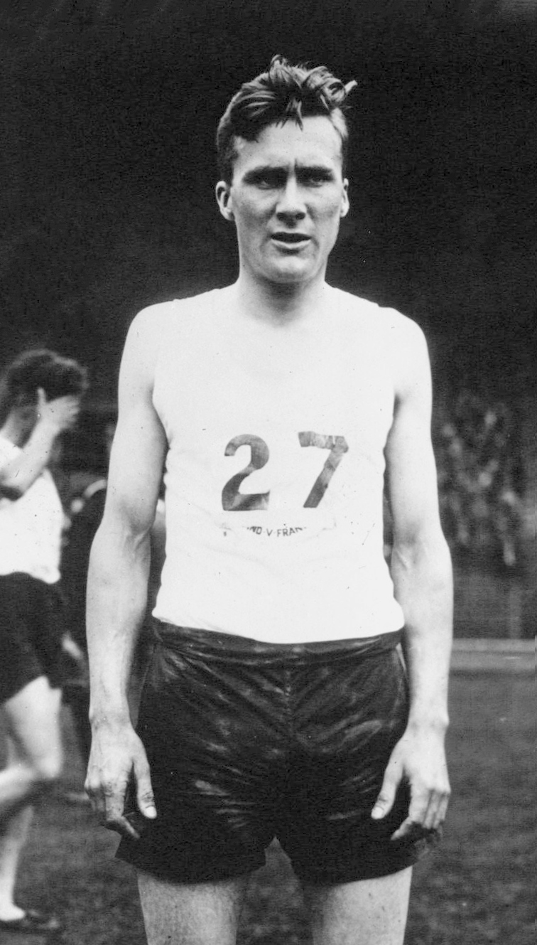 Evenson, athlète anglais (Rol.) : [photographie de presse] / Agence Meurisse